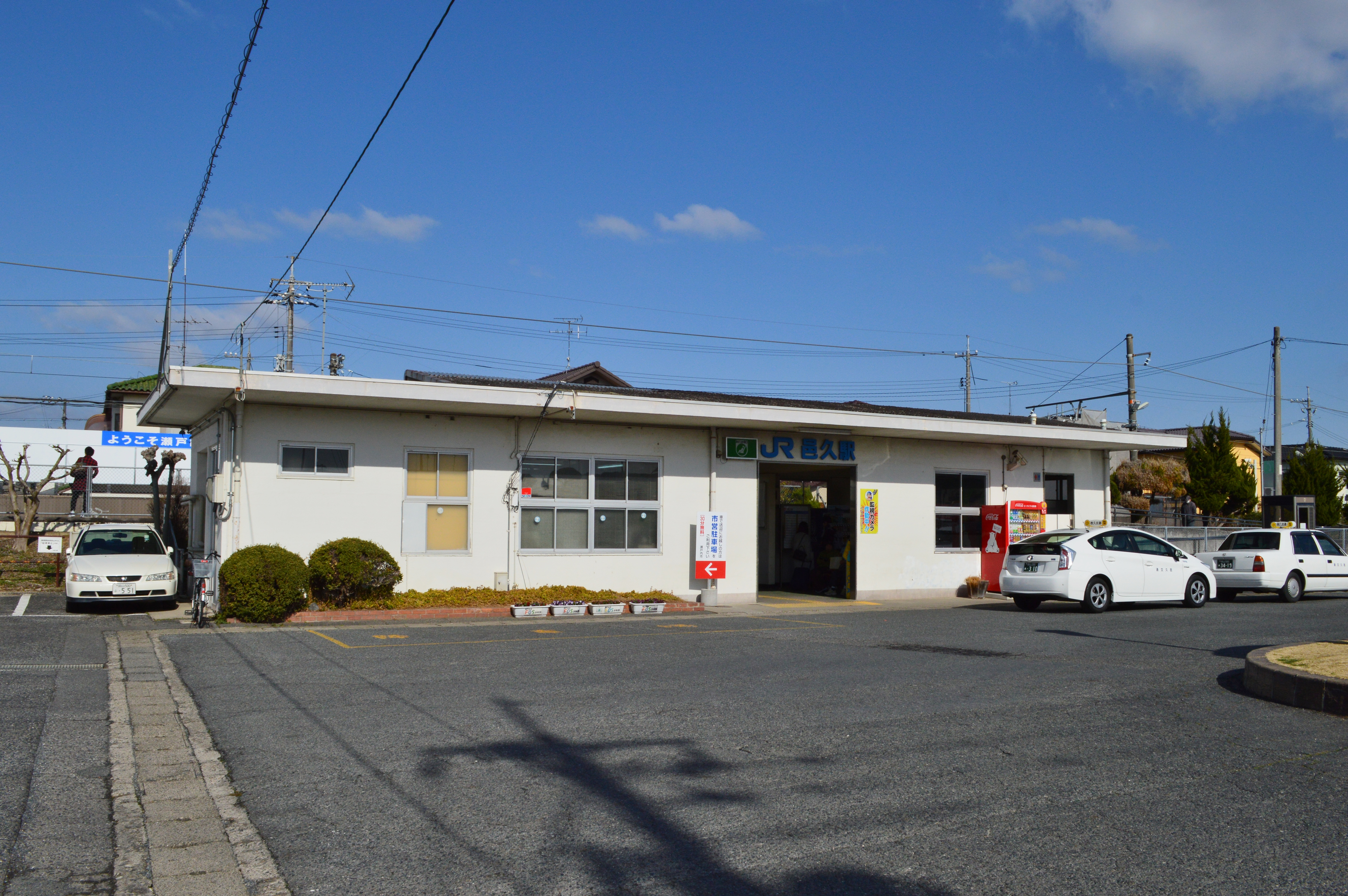 邑久駅 駅舎